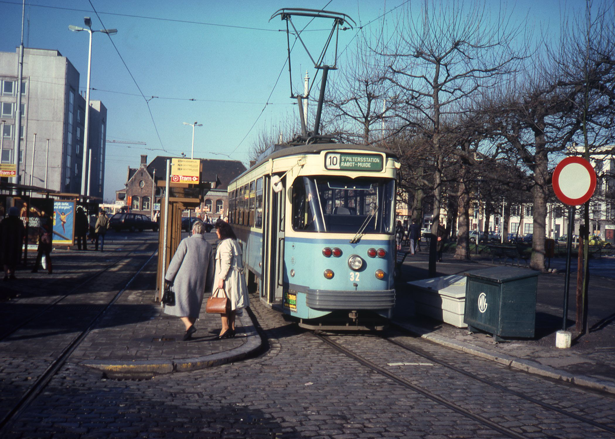 De tramlijn 10 op de keerlus bij Gent-Sint-Pieters. Later is deze lijn opgegaan in lijn 40